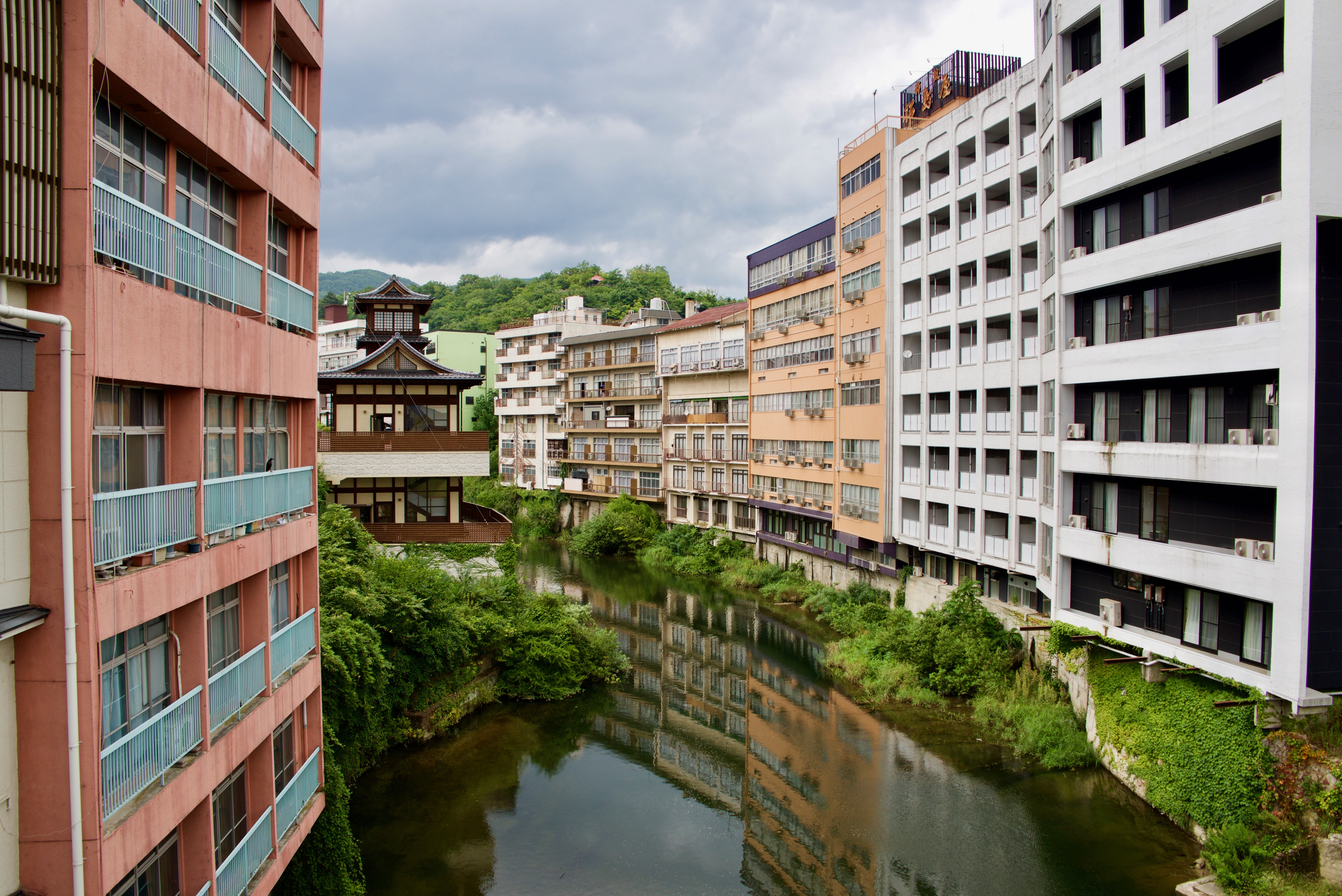 福島市飯坂温泉